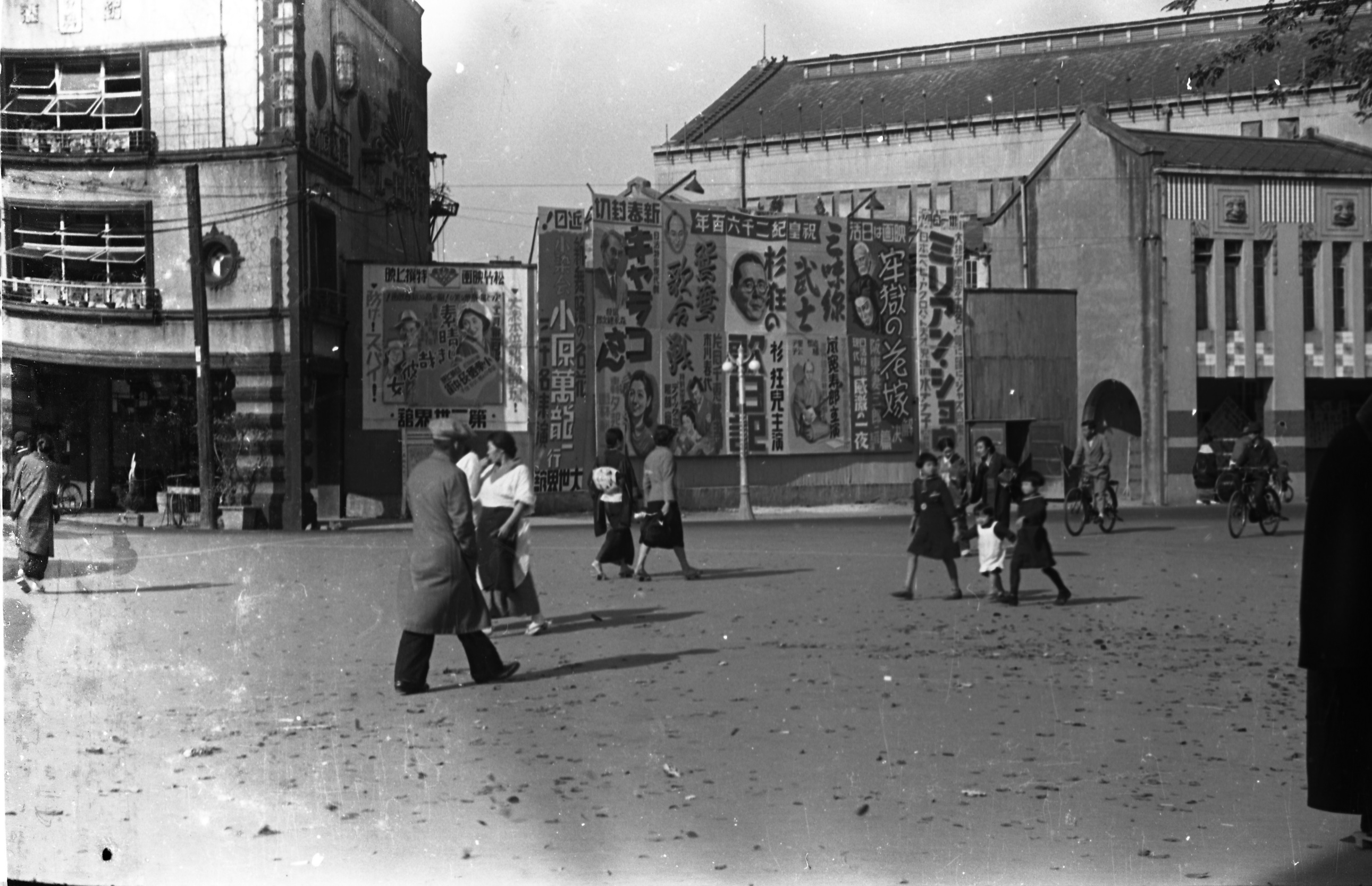 電影院「新世界館」旁，臺北。